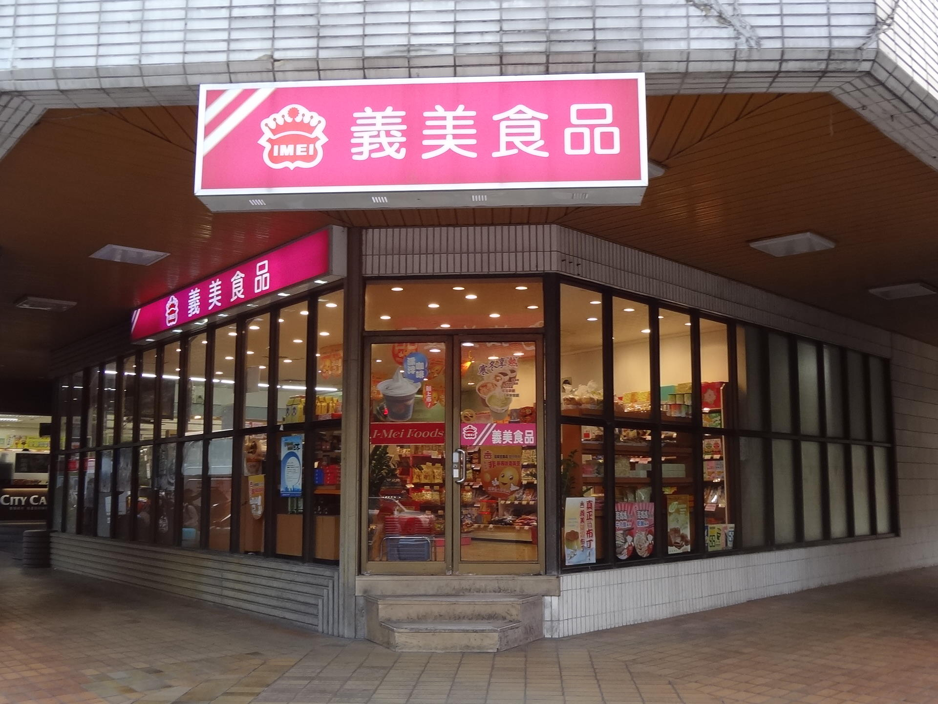 義美食品北市軍友社門市，位於臺北市中正區長沙街一段20號1樓（台北國軍英雄館）。